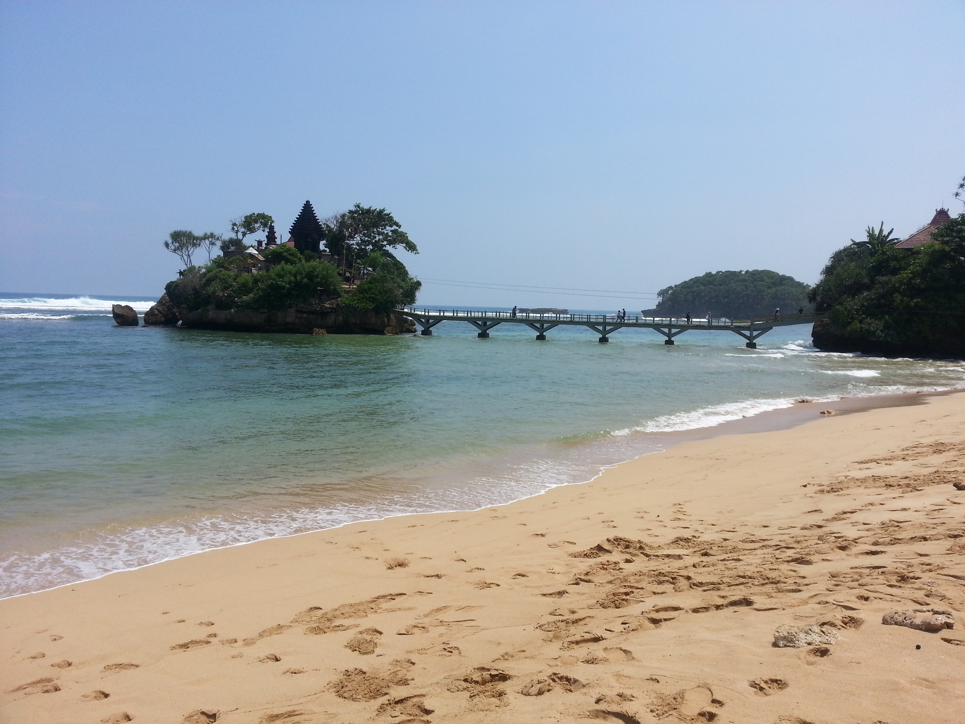 pantai Balekambang, terdapat Pura Amarta Jati di atas pulau kecil Ismoyo